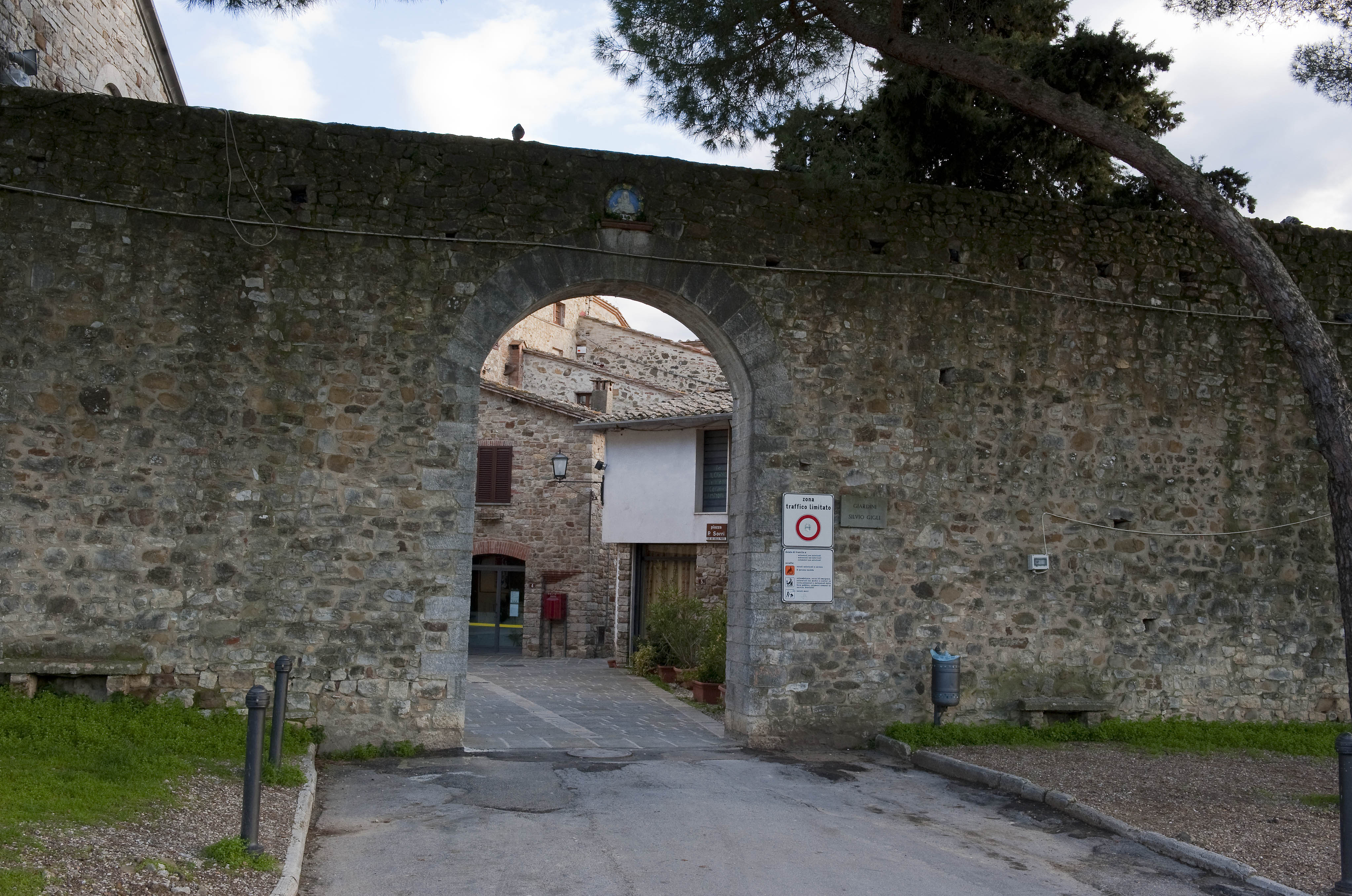 Porta medioevale - San Gusmè- Siena